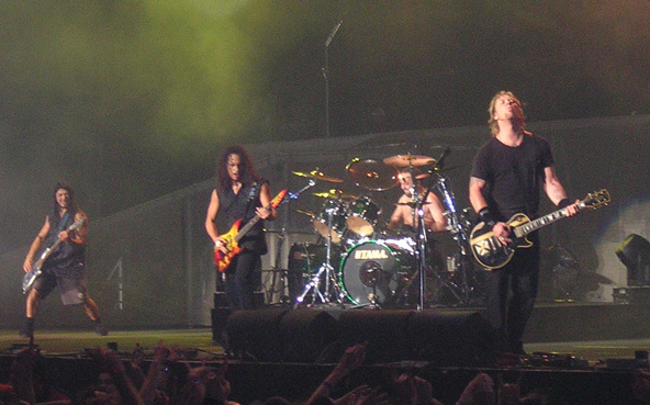 Metallica